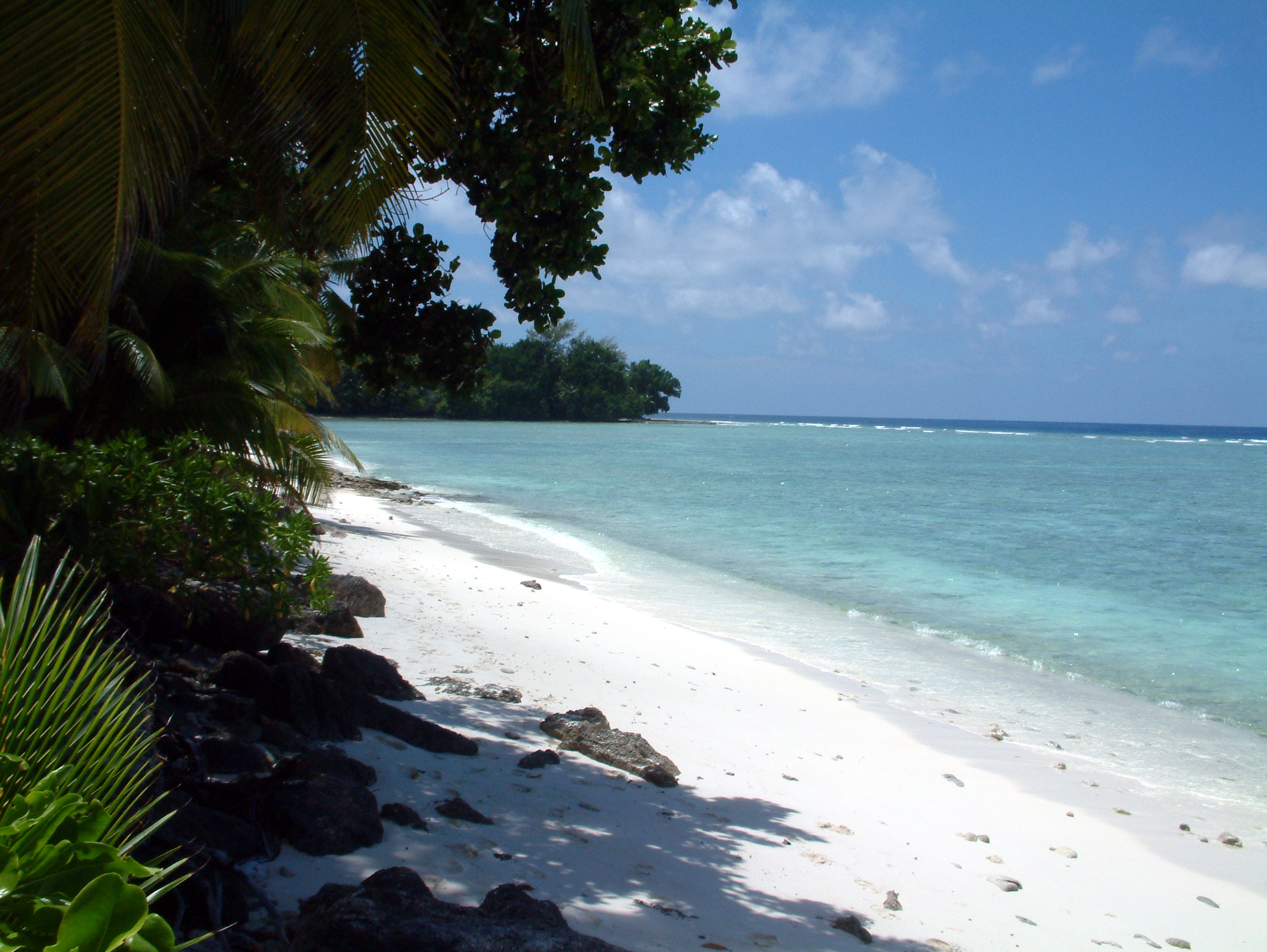 A beautiful view